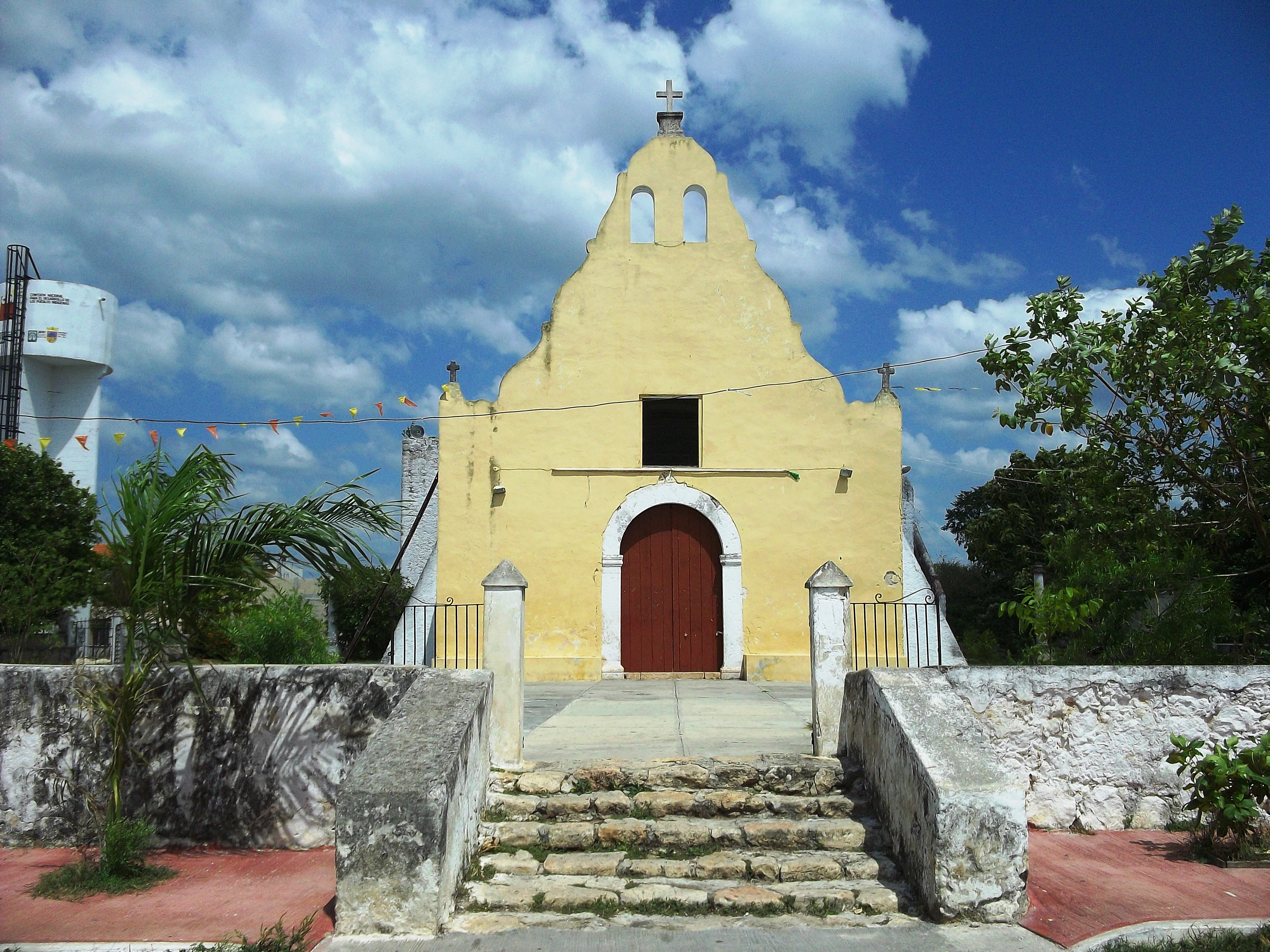 Iglesia de Ekmul, Yucatán.